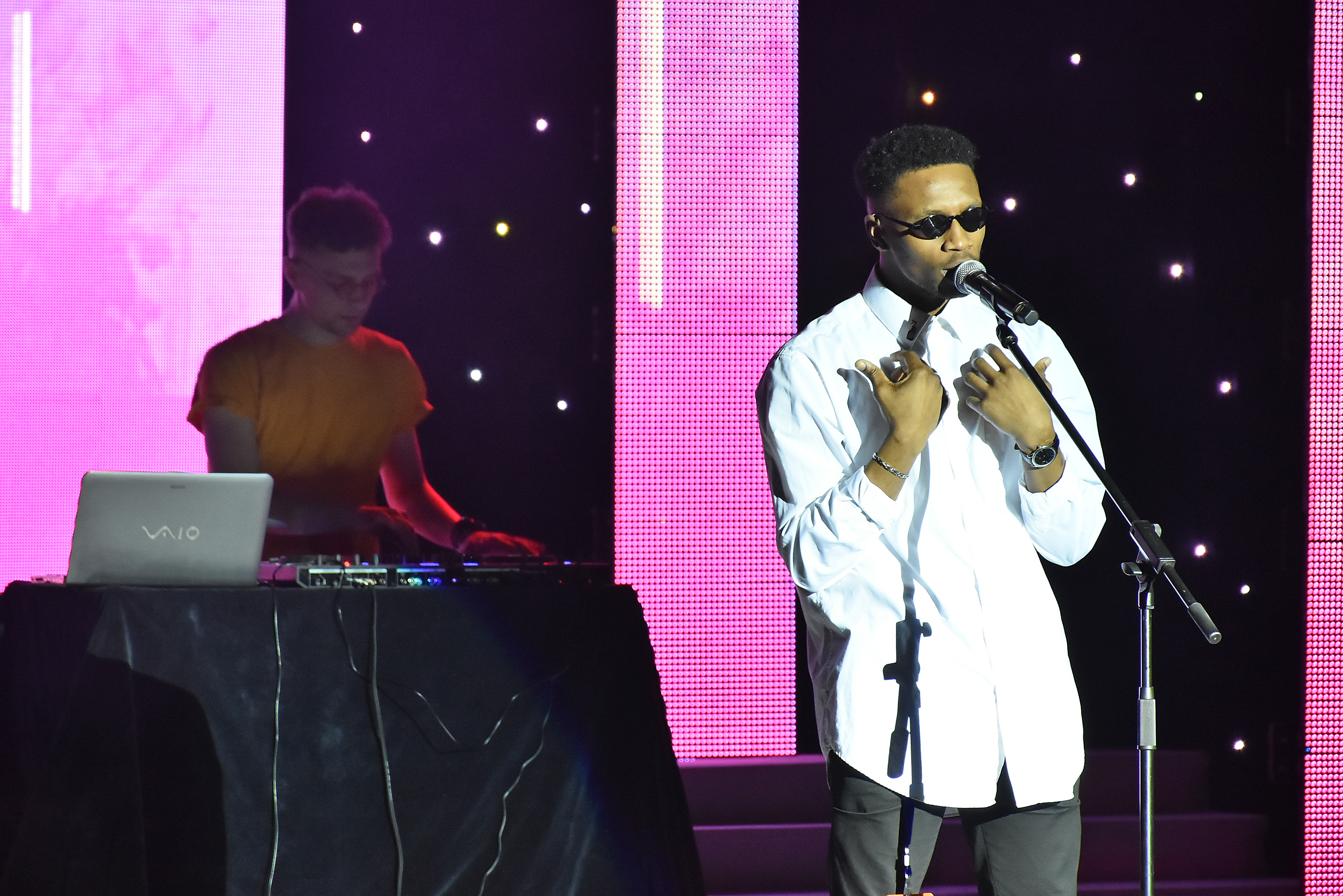 Гурт «Tvorchi» виступає на конкурсі краси «СтудМіс ТДМУ 2019». Тернопільський академічний обласний драматичний театр імені Тараса Шевченка, 4 квітня 2019 року.